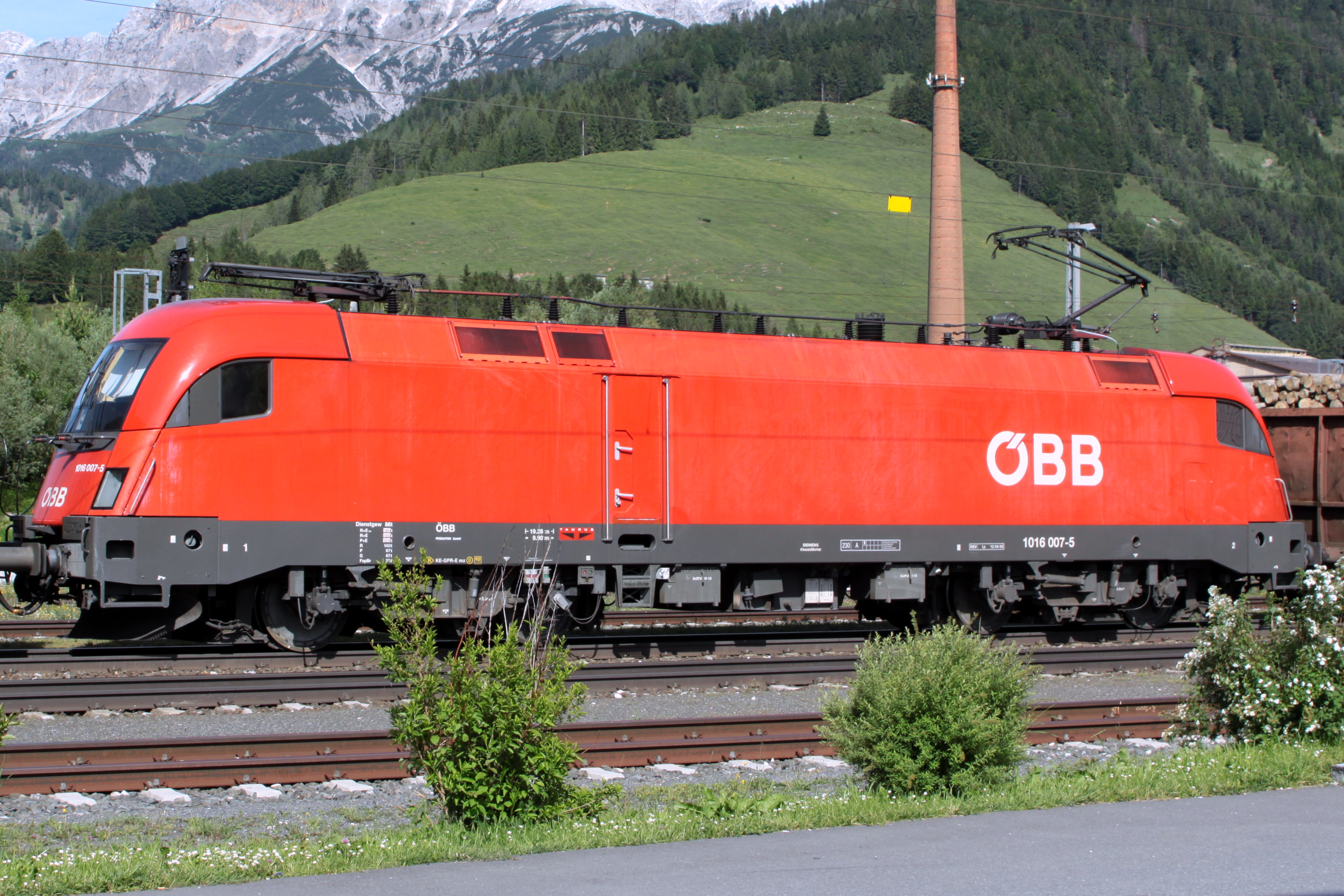 ÖBB 1016 007-5 an der Gare vun Hochfilzen